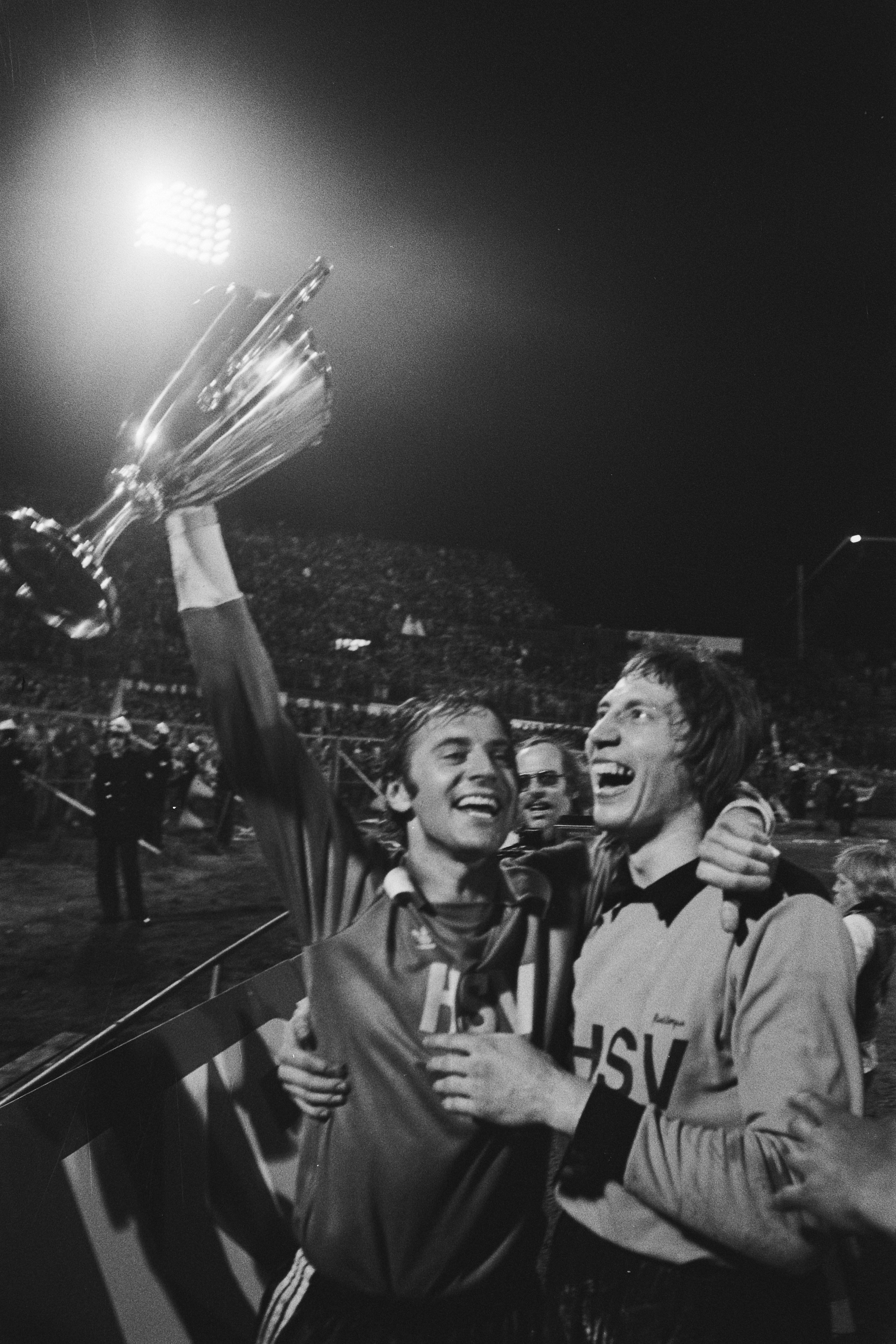 Collectie / Archief : Fotocollectie Anefo Reportage / Serie : [ onbekend ] Beschrijving : Anderlecht tegen HSV (finale Europa Cup II ); HSV-spelers met de beker, Willi Reimann en keeper Rudi Kargus Datum : 11 mei 1977 Locatie : Amsterdam Trefwoorden : sport, voetbal Persoonsnaam : Kargus, Rudi, Magath, Felix Fotograaf : Peters, Hans / Anefo Auteursrechthebbende : Nationaal Archief Materiaalsoort : Negatief (zwart/wit) Nummer archiefinventaris : bekijk toegang 2.24.01.05 Bestanddeelnummer : 929-1736